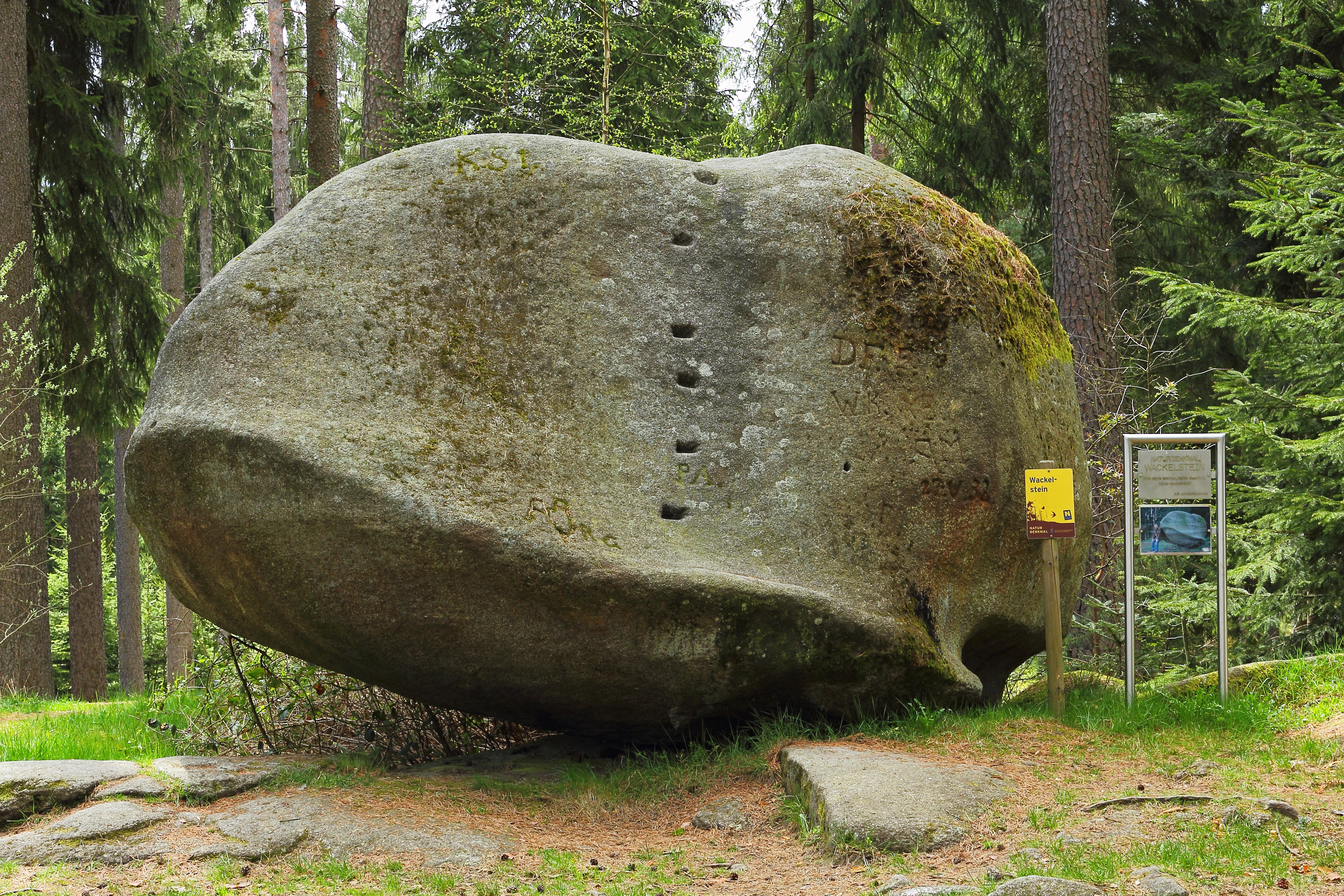 Der Wackelstein im Schremser Wald bei Amaliendorf wurde bereits 1927 zum Naturdenkmal erklärt. This media shows the natural monument in Lower Austria with the ID GD-017.